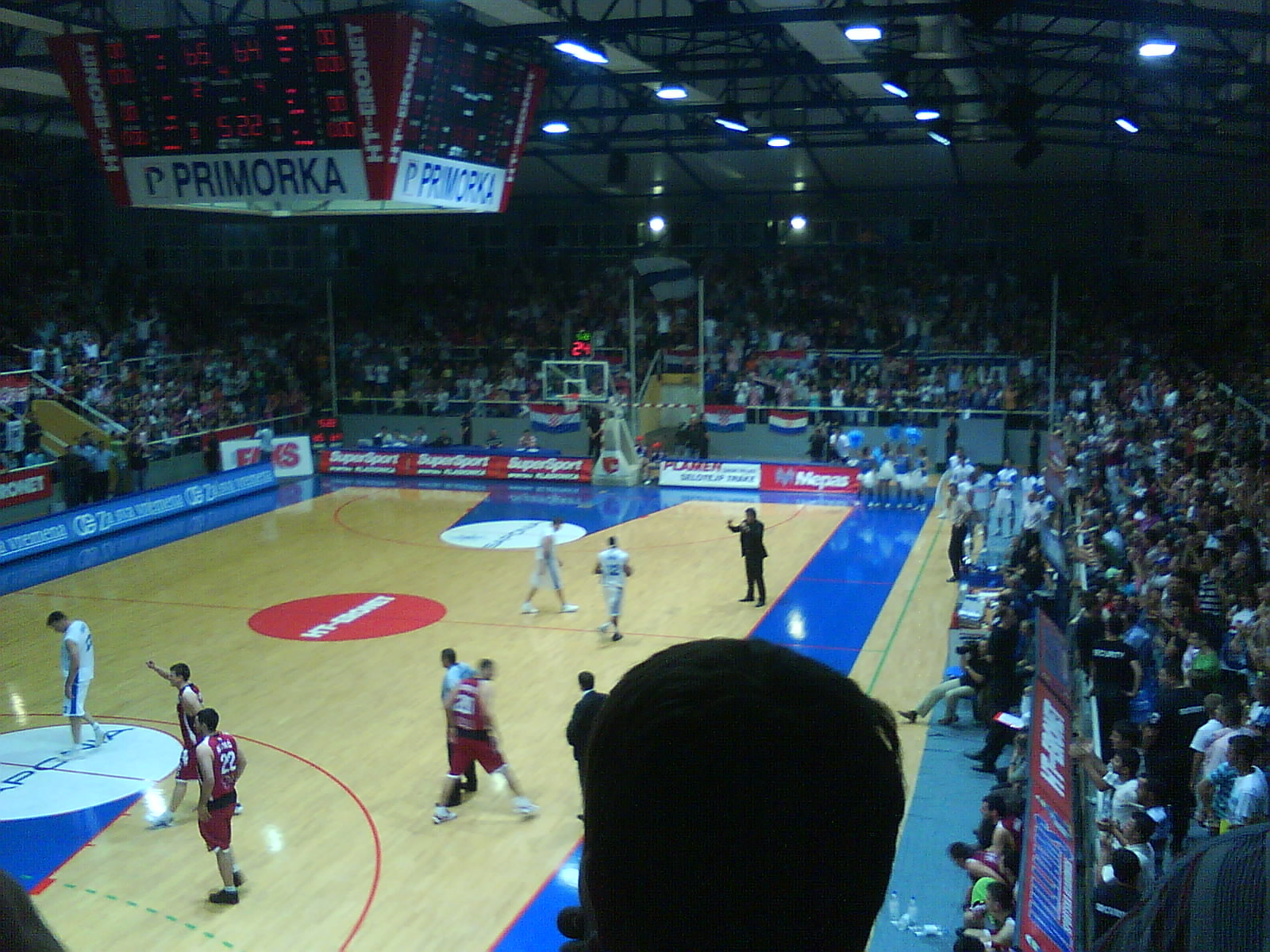 Pecara basketball stadium in Široki Brijeg